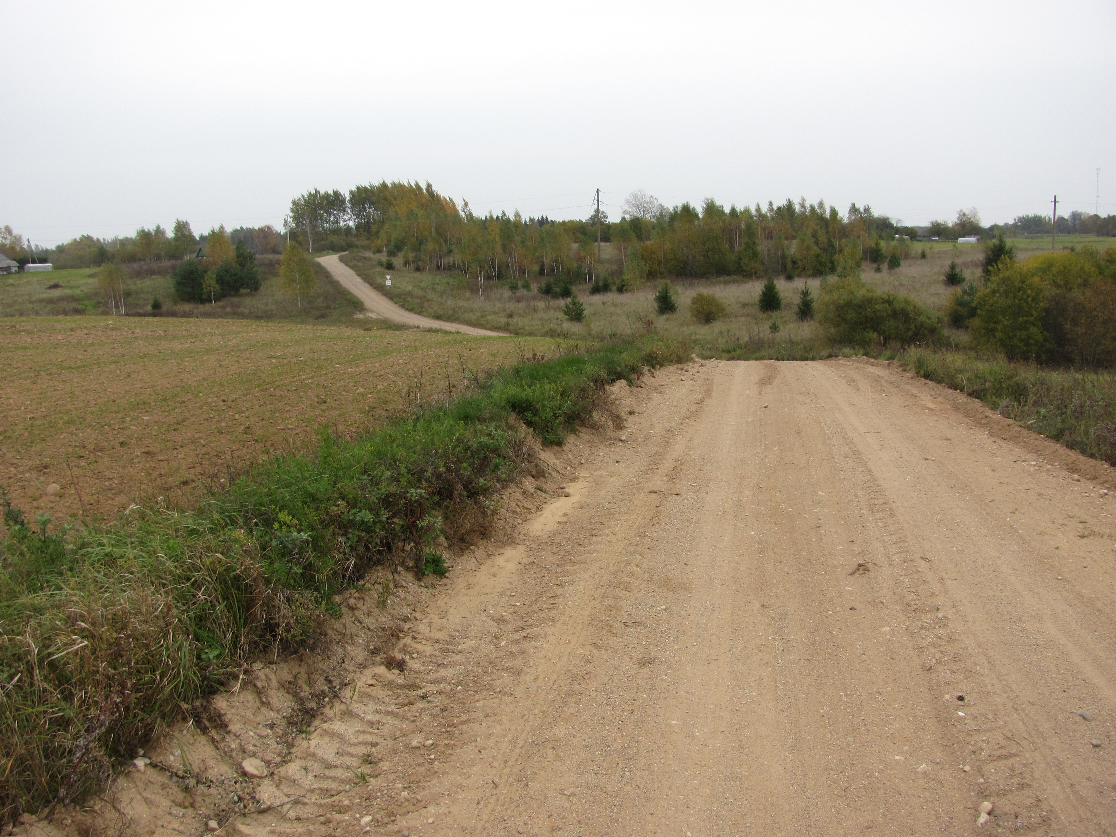 Vyžuonų sen., Lithuania